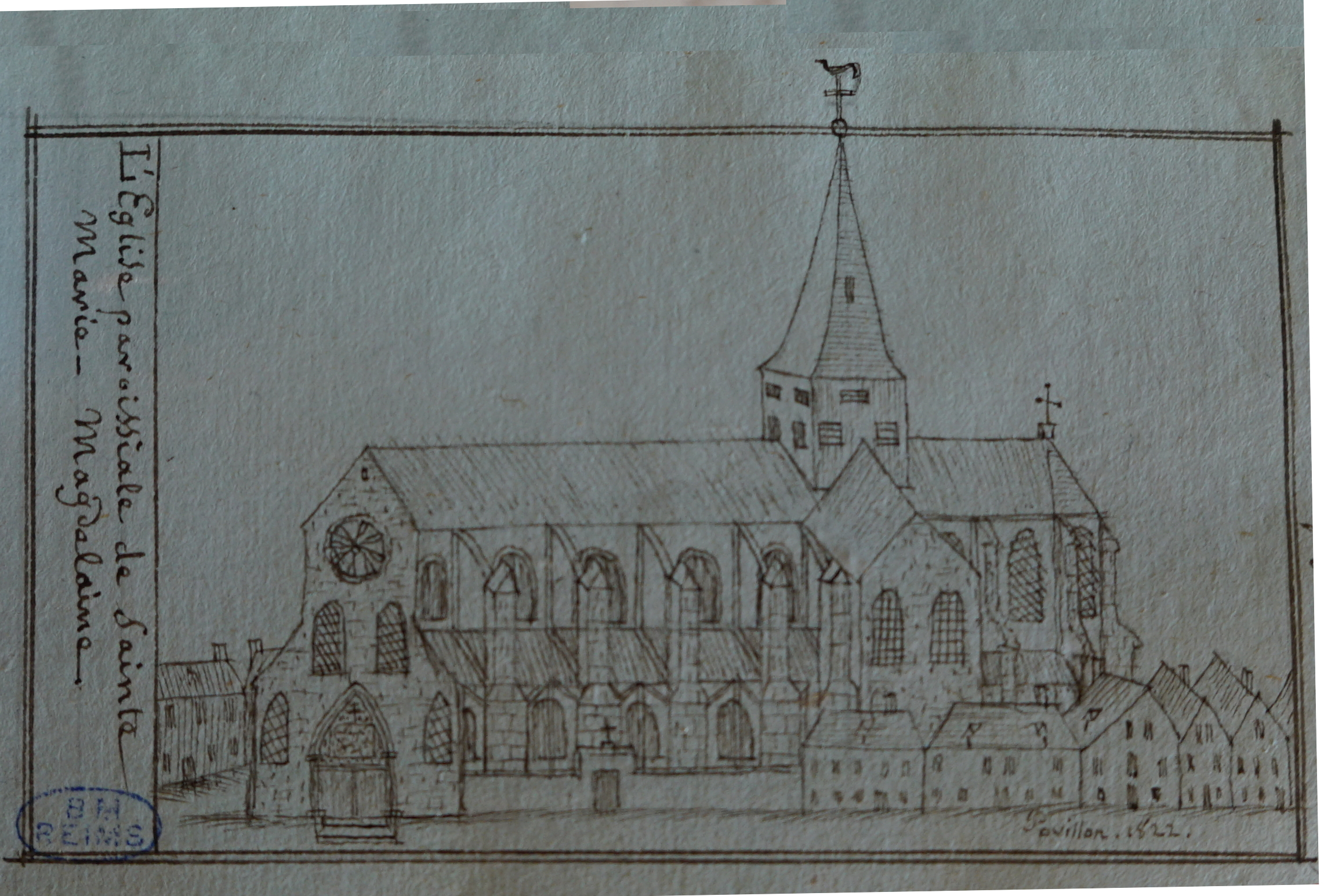 dessin de Povillon pierard issue du maniscrit de la meme main.